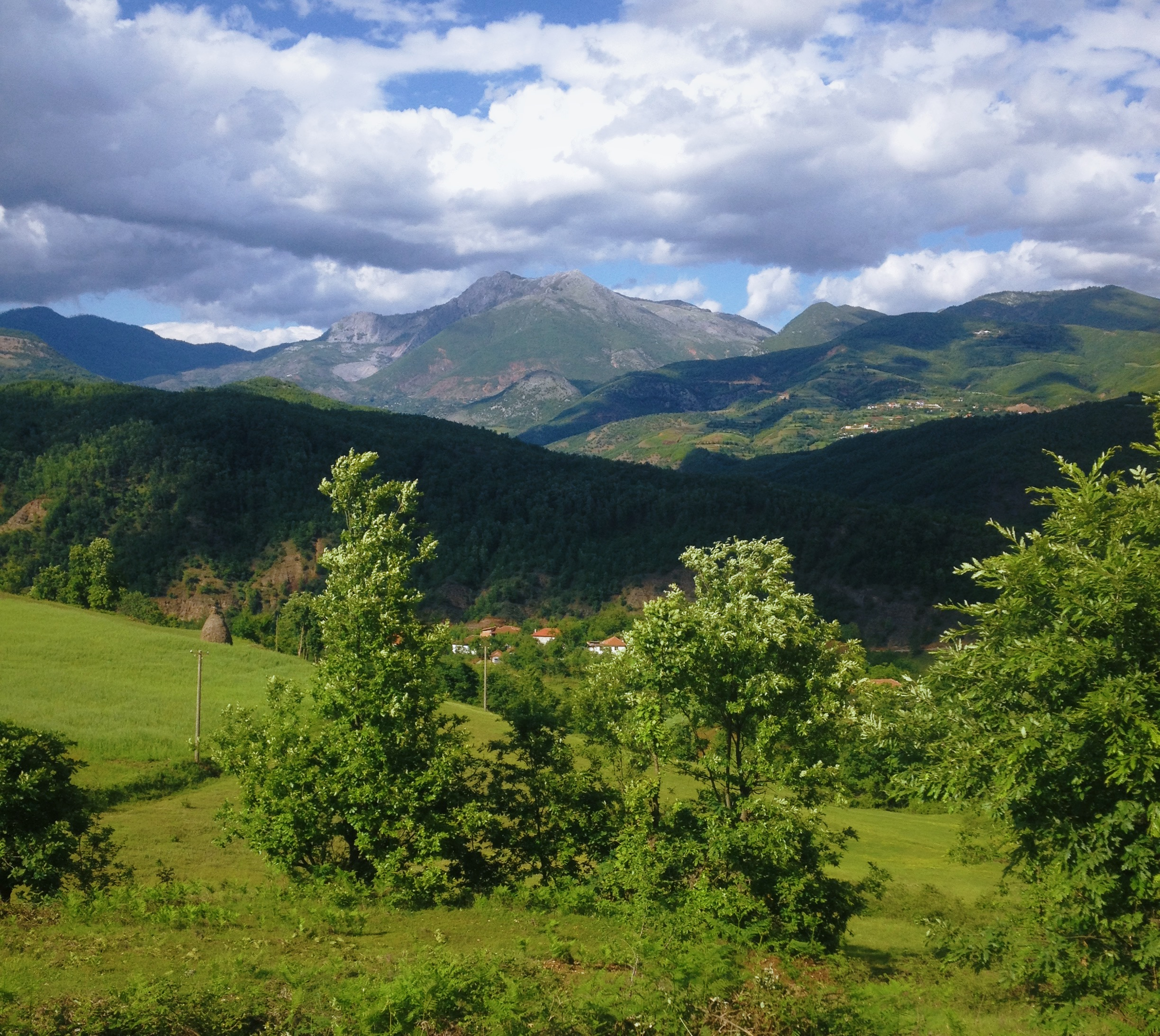 Kuturman, Librazhd